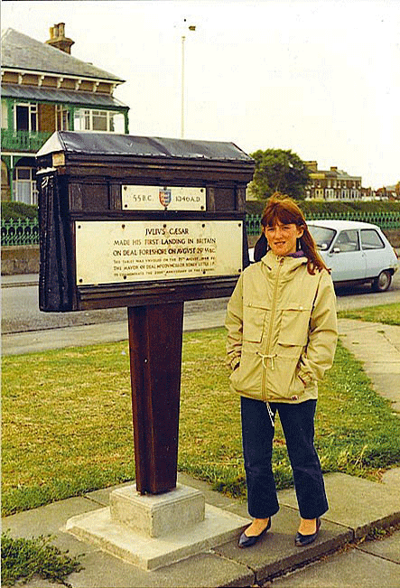 Commémoration du débarquement de Jules César. 1946Brezhoneg: Delwenn dilestradeg Jul Kezar. 1946